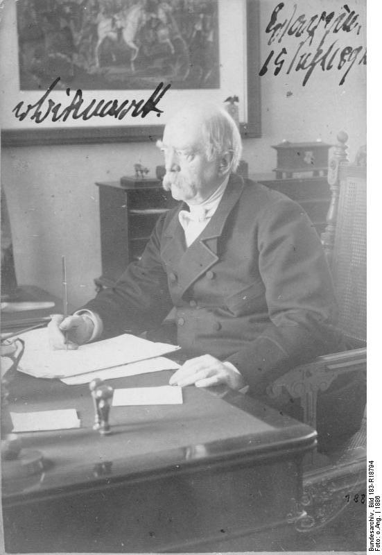 Zentralbild Otto, Fürst von Bismarck-Schönhausen, preußisch-deutscher Staatsmann, geb.: 1.4.1815 in Schönhausen, gest.: 30.7.1898 in Friedrichsruh; seit 1862 preußischer Ministerpräsident und Außenminister, und vom 18.1.1871 bis 1890 Reichskanzler des von ihm gegründeten Kaiserreichs. UBz.: Fürst Otto von Bismarck am Schreibtisch (1892) 20224-31